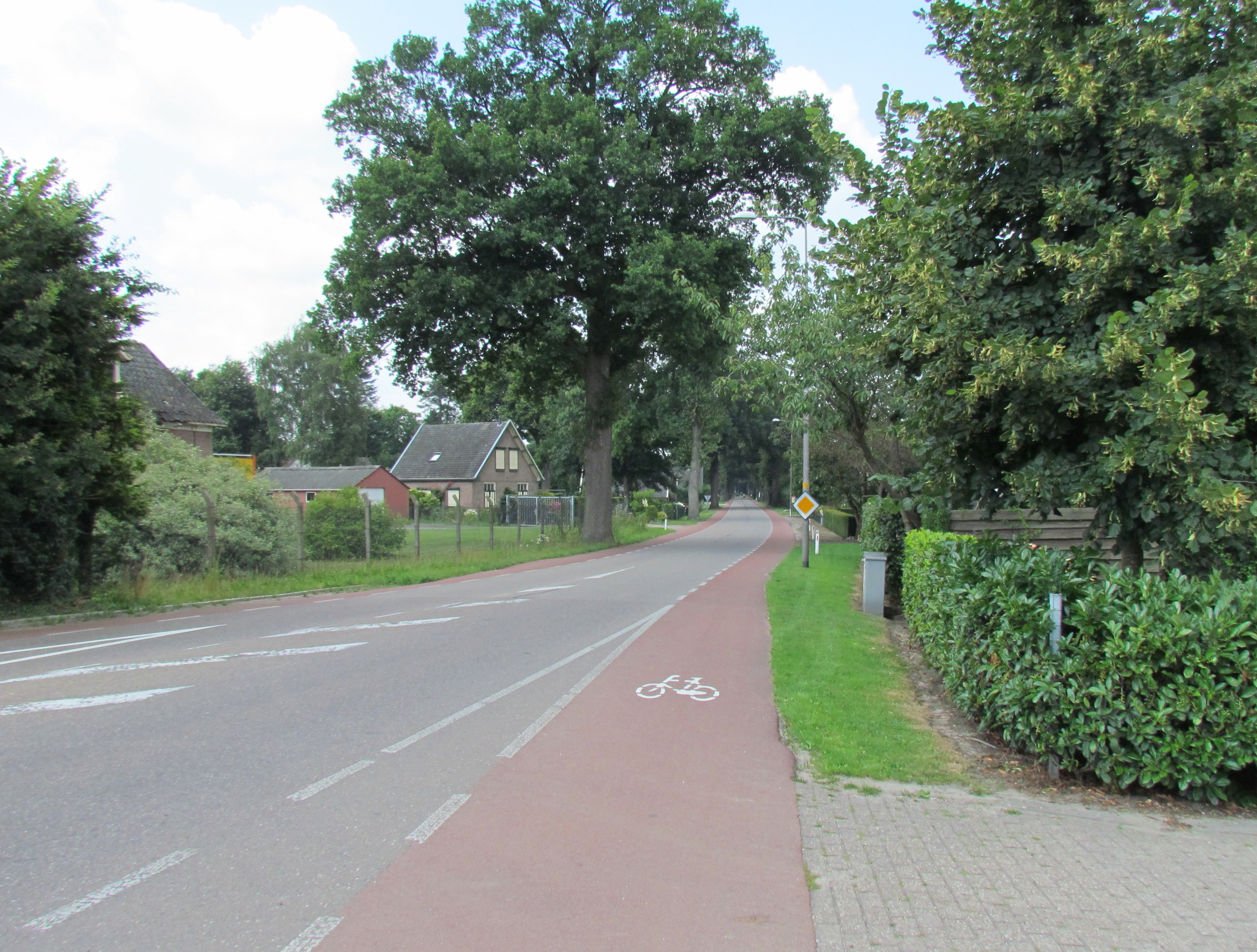 Deventerweg (N790) bij Gietelo, gemeente Voorst (NL)